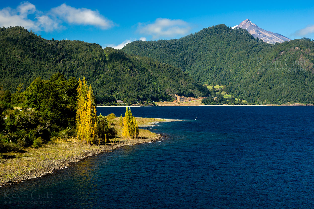 Lago Panguipulli mit Choshuenco im Hintergrund